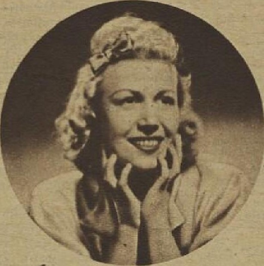 Inka Zemánková (1915-2000), česká swingová zpěvačka